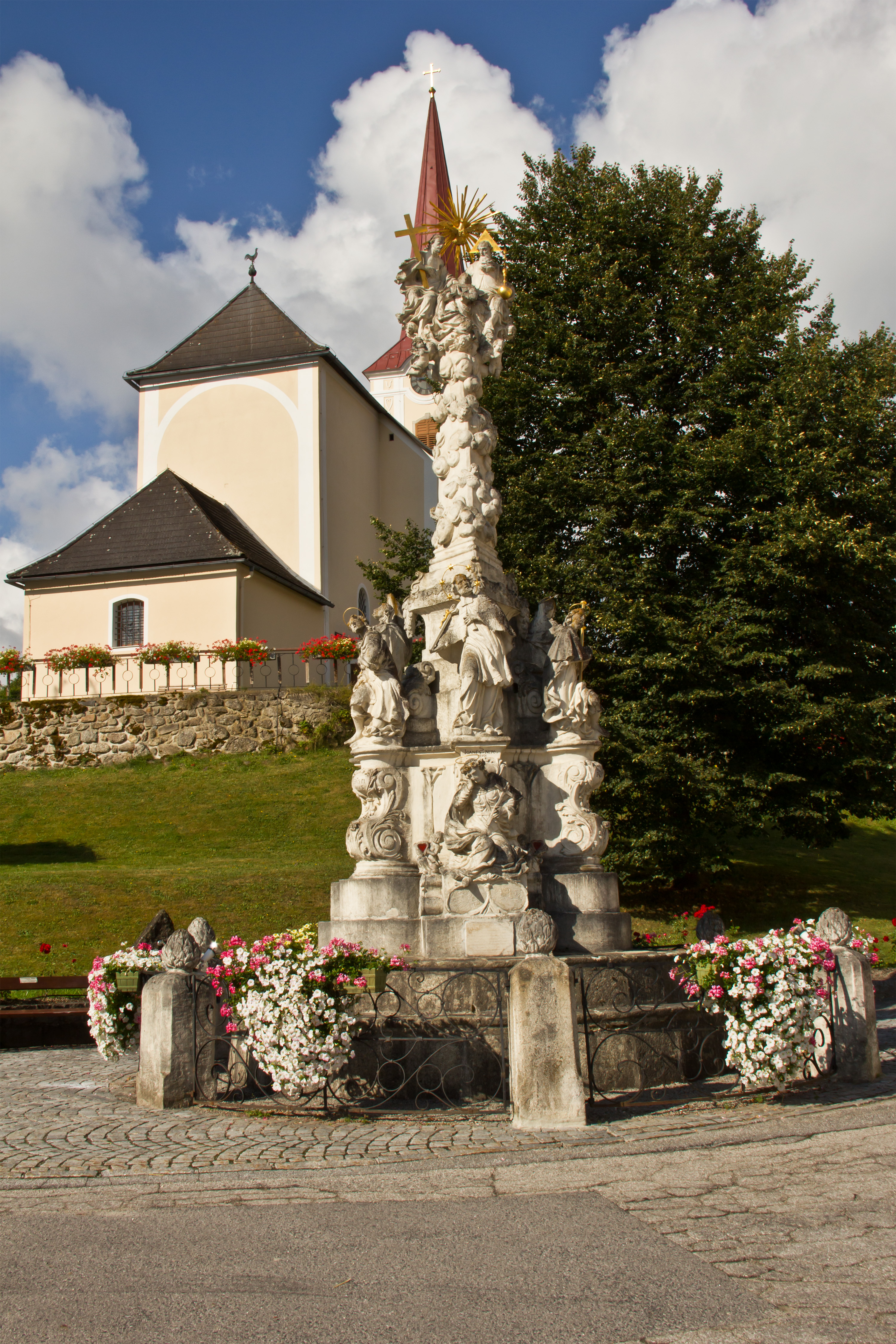 Die Pestsäule am Hauptplatz unterhalb der Kirche wurde 1715 von Ernst Sigismund Hacklberg-Landau errichtet.